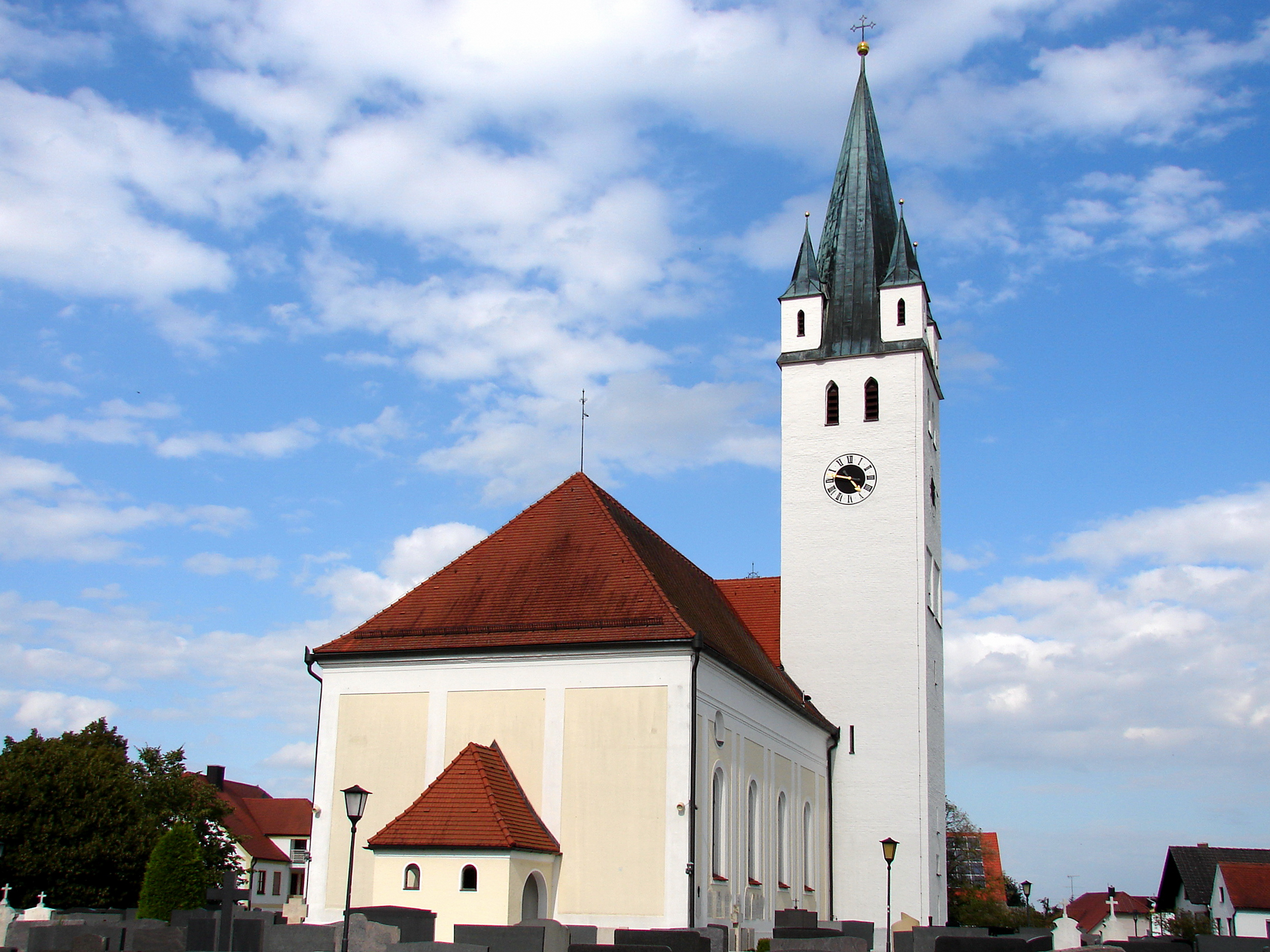 Katholische Pfarrkirche, Saalkirche, Turm bezeichnet mit dem Jahr 1354 und Kern des Chores gotisch, Langhausneubau von Franz Anton Kirchgrabner, vor 1780; mit Ausstattung; - Gedächtniskapelle, offener Satteldachbau mit Treppengiebel, Ende 19. Jahrhundert; im Friedhof.